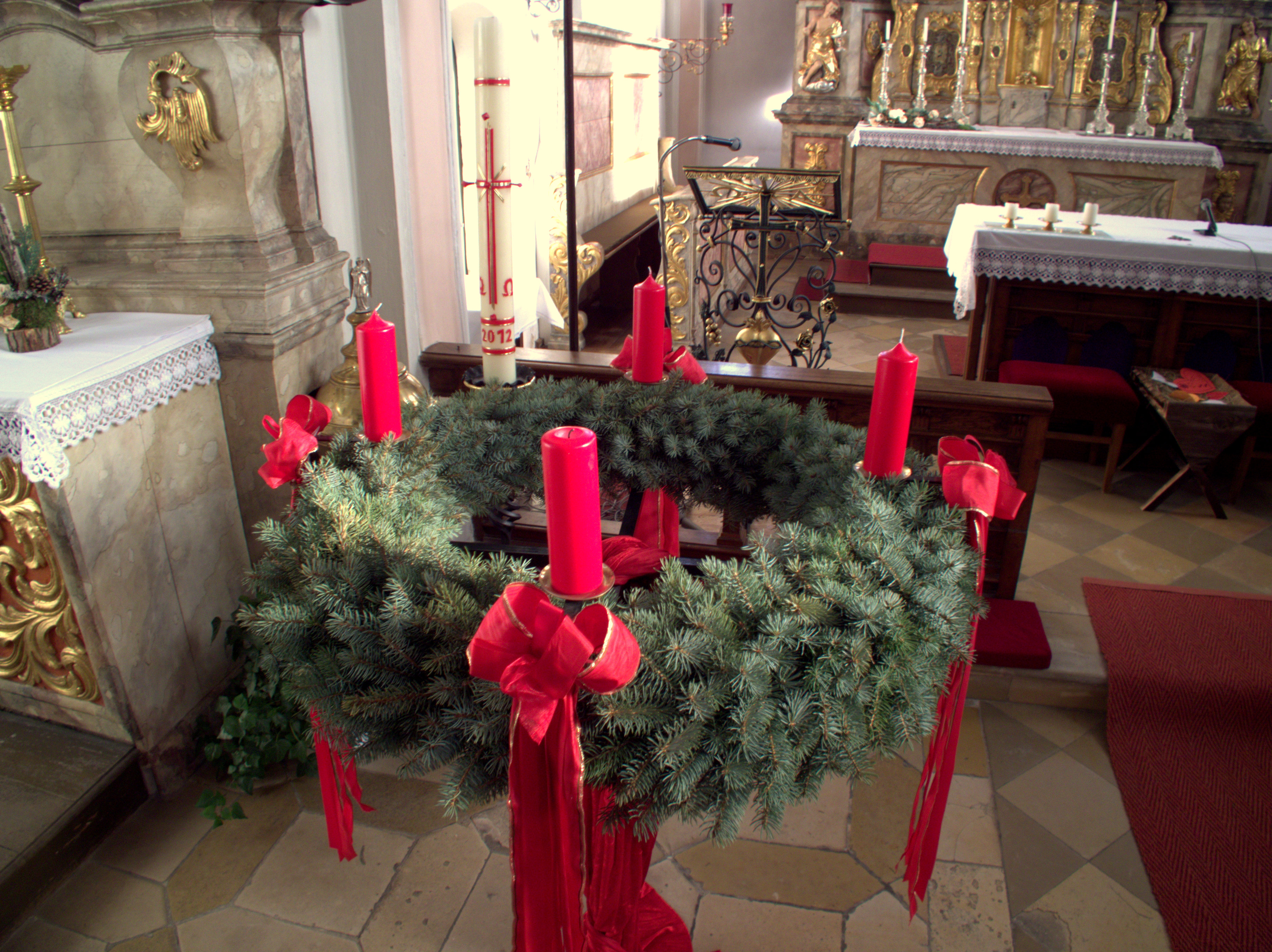 Pfarrkirche Mariä Verkündigung in Günching, Ortsteil der Oberpfälzer Stadt Velburg